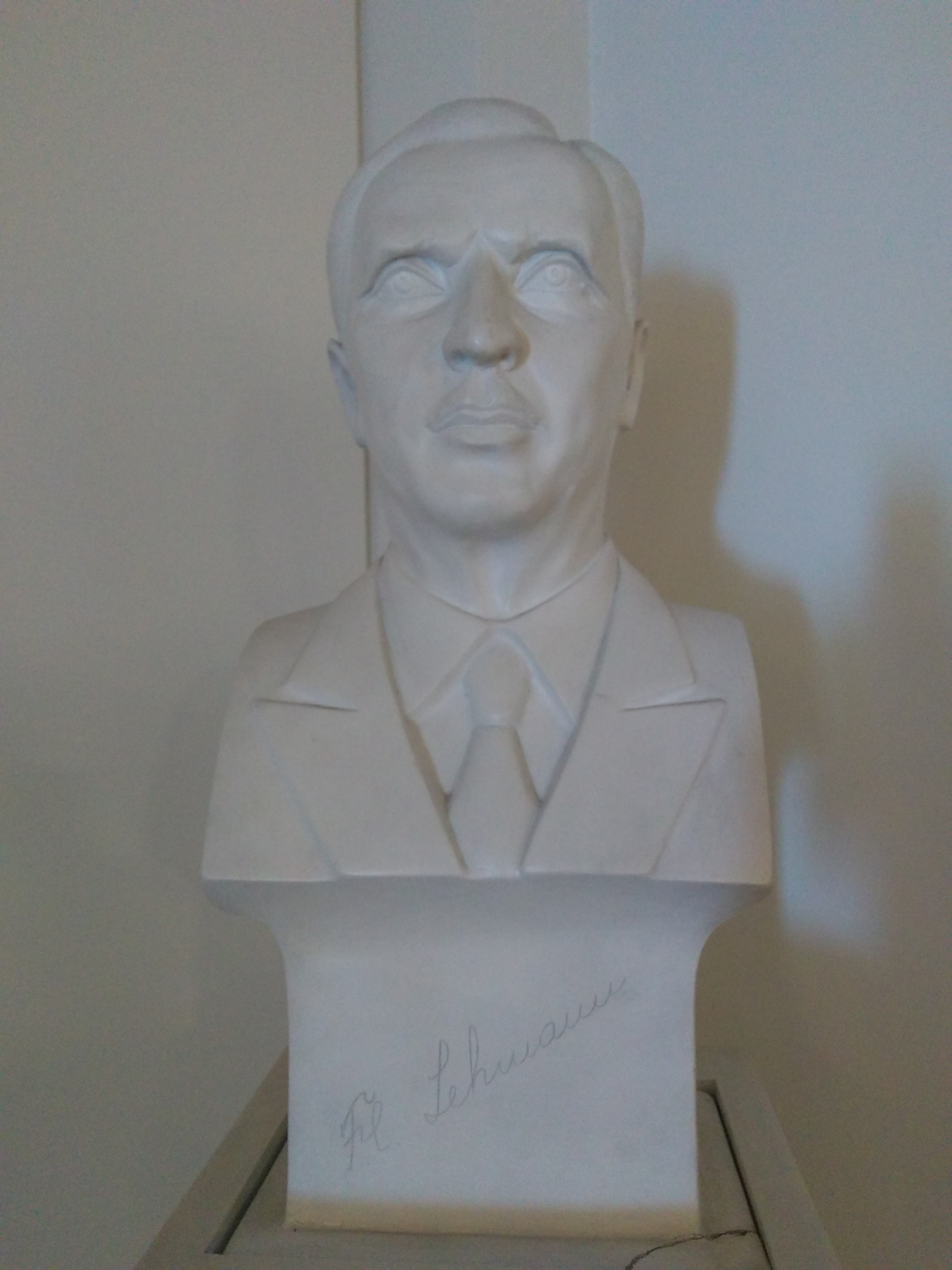 Busto de Federico Carlos Lehman en el Museo de Ciencias Naturales Federico Carlos Lehmann